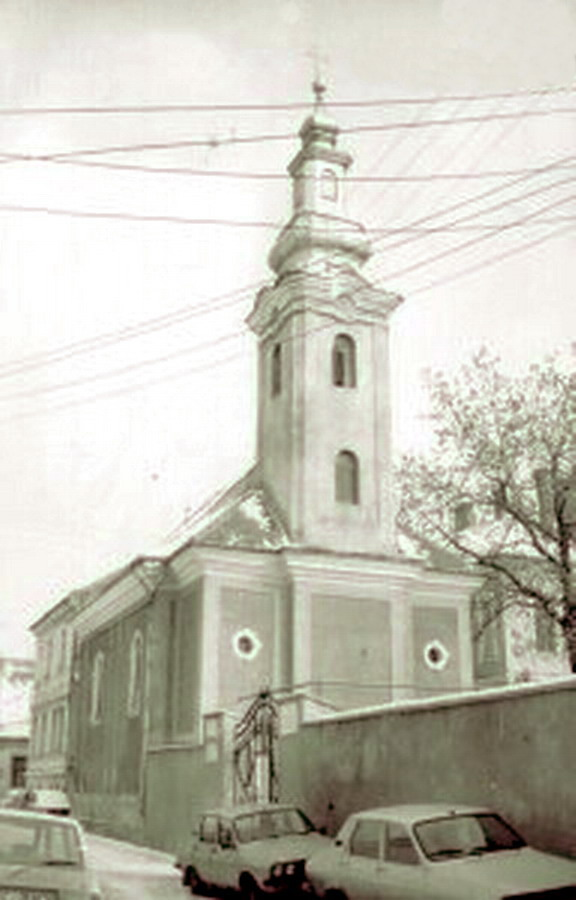 Cluj-Napoca Bob Church